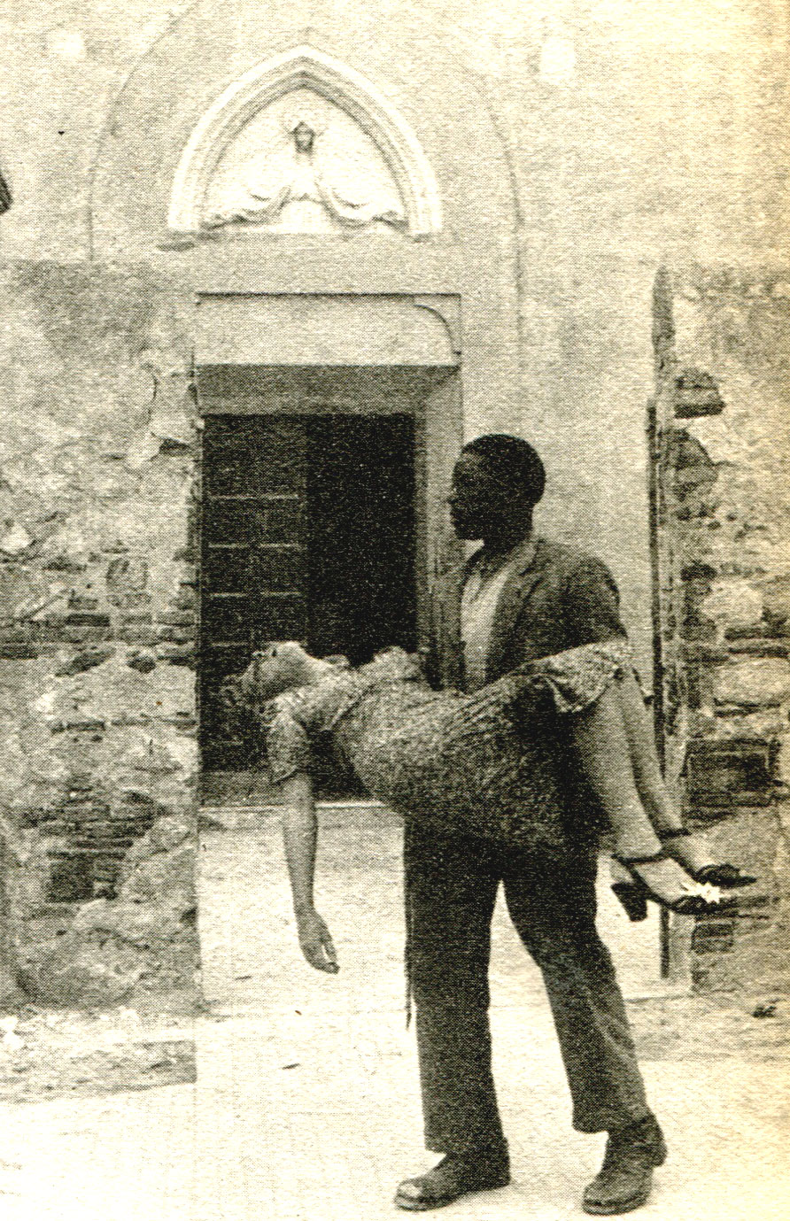 Carla Del Poggio e John Kitzmiller in una scena finale di "Senza Pietà" (Lattuada, 1948)